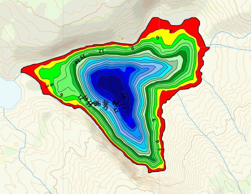 Dybdekart over Storgamvatnet